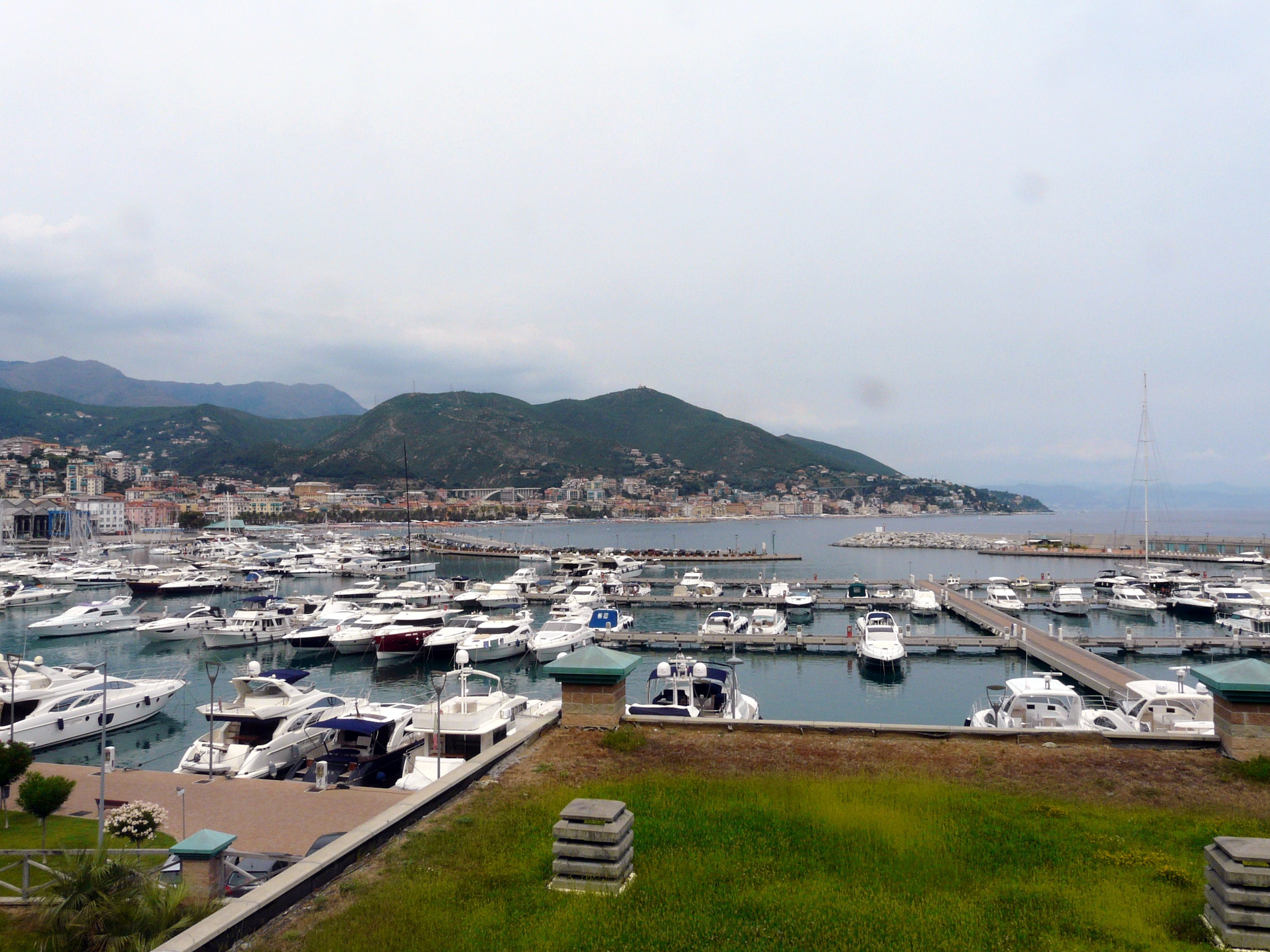 Panorama del porto Marina di Varazze, Liguria, Italia